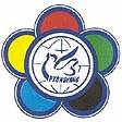 Logo Festival Mundial de la Juventud y los Estudiantes